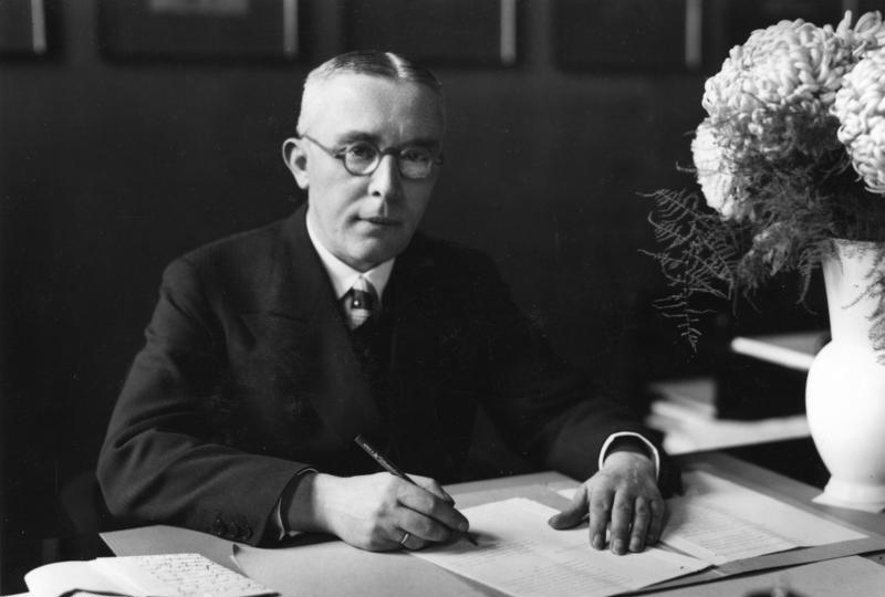 Zentralbild Prof. Dr. Johannes Popitz, Finanzpolitiker u. Staatsmann, geb.: Leipzig 2.12.1884; seit 1.11.1932 Reichsminister, seit 1922 Honorarprofessor der Finanzwissenschaften un des Steuerrechts an der Universität Berlin. U.B.z.: den preußischen Finanzminister; Staatsrat Prof. Dr. Johannes Popitz. (Aufnahme 1934) 43383-34 Abgebildete Personen: Popitz, Johannes Prof. Dr.: Finanzminister, Preußen, Prozeß 20. Juli 1944, Deutschland